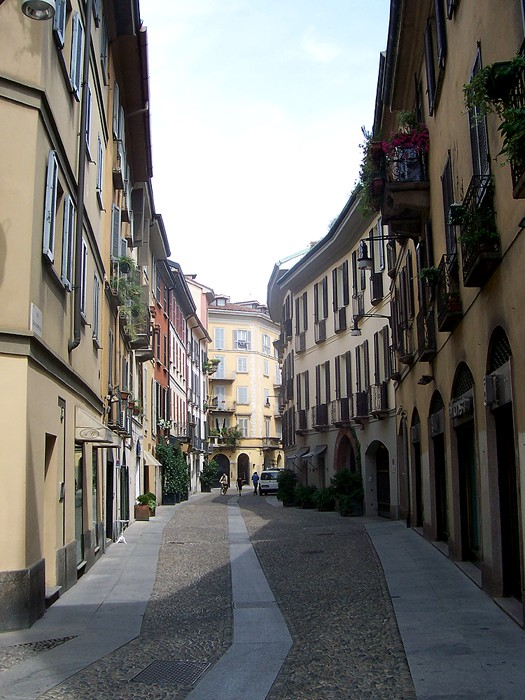 Milano - Via Madonnina